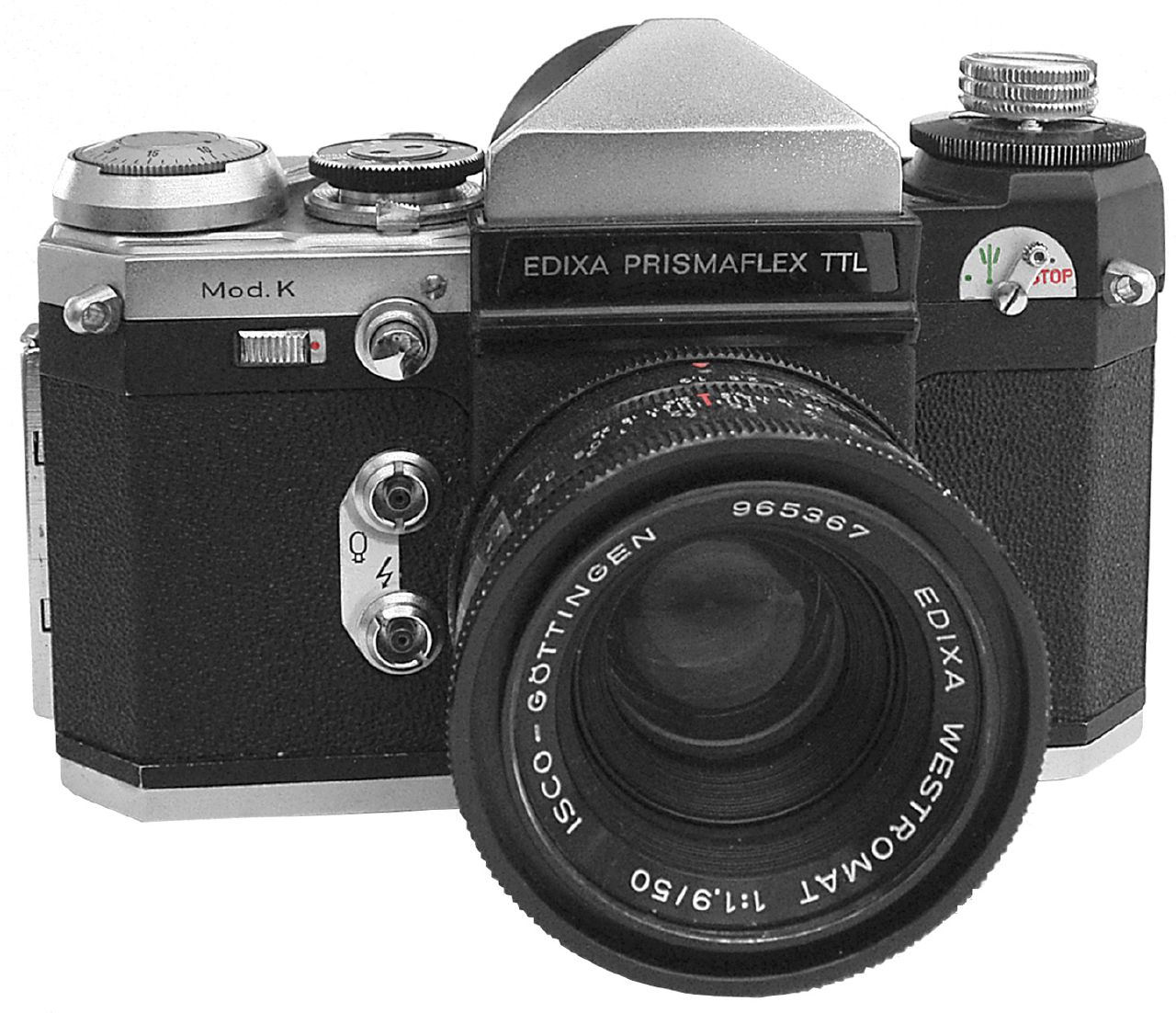 Die „Edixa“-Modelle der Firma Wirgin Wiesbaden hielten noch eine Zeitlang dem Konkurrenzdruck der damals in den europäischen Markt eindringenden japanischen Spiegelreflexkameras stand. Doch eine ungeschickte Modellpolitik – es gab zahlreiche Variationen eines Modells, die sich nur in Details unterschieden – und Qualitätsmängel führten letzten Endes auch zum Ende der Marke „Edixa“. Der Name lebt allerdings als Handelsname noch weiter, hat aber mit den ursprünglichen Edixas nichts mehr zu tun. Eine „Edixa Prismaflex LTL“ war meine erste Spiegelreflexkamera Ende der 60er. Die abgebildete ist aber eine „TTL“. Der Unterschied ist der, dass bei der TTL die Belichtungsmesseranzeige nicht im Sucher, sondern von oben einsehbar war. Die hier ist also doch nicht meine „erste“, denn bei der war der Belichtungsmesserzeiger im Sucher sichtbar. Hier die technischen Daten: Belichtungsmessung durch das Objektiv Meßmethode: Messung bei abgeblendetem Objektiv, Anzeige außen ablesbar Meßsystem: Gesamtfeldmessung Empfindlichkeit des CdS-Meßwerks: 10-32 DIN im Bereich von 2 bis 1/1000 s Verschlußzeiten: ¼ s – 1/1000 s Sucher: Pentaprismensucher und Schnittbildentfernungsmesser fest eingebaut Spiegel: Rapid-(Rückschwing-) Spiegel Anschlußart: Schraubfassung M42 für Wechselobjektive Baujahr: 1967 Die Objektivauswahl war riesengroß. Jeder namhafte westdeutsche Objektiv-Hersteller hatte Edixa-Objektive im Angebot: Schneider, Steinheil, Rodenstock, Schacht, Enna, ISCO ...